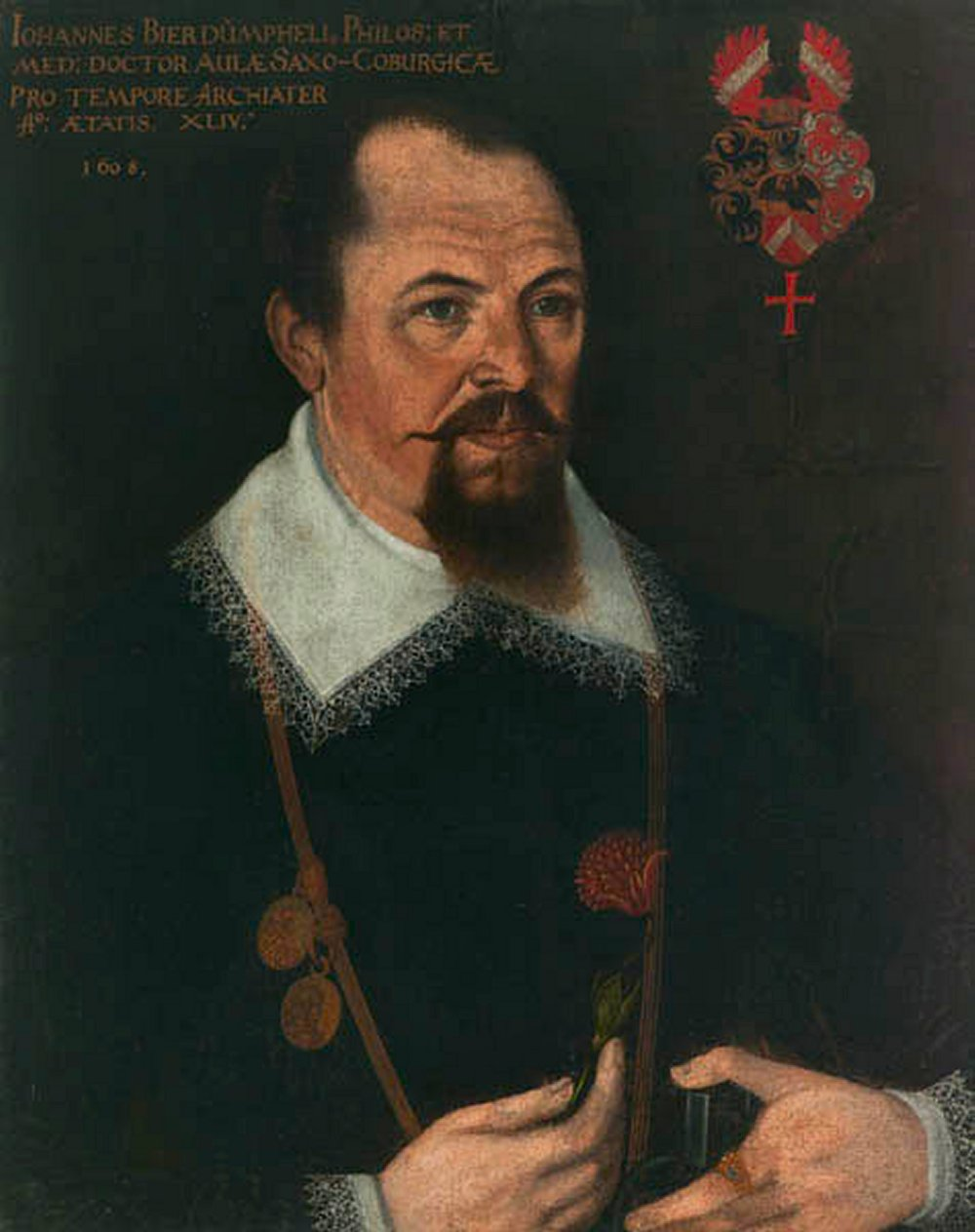 Dr. phil. et Dr. med. Johann Bierdümpfel (1564-1620), Leibarzt von Herzog Casimir zu Sachsen-Coburg, Arzt der Niederösterreichischen Stände, Autor medizinischer Werke